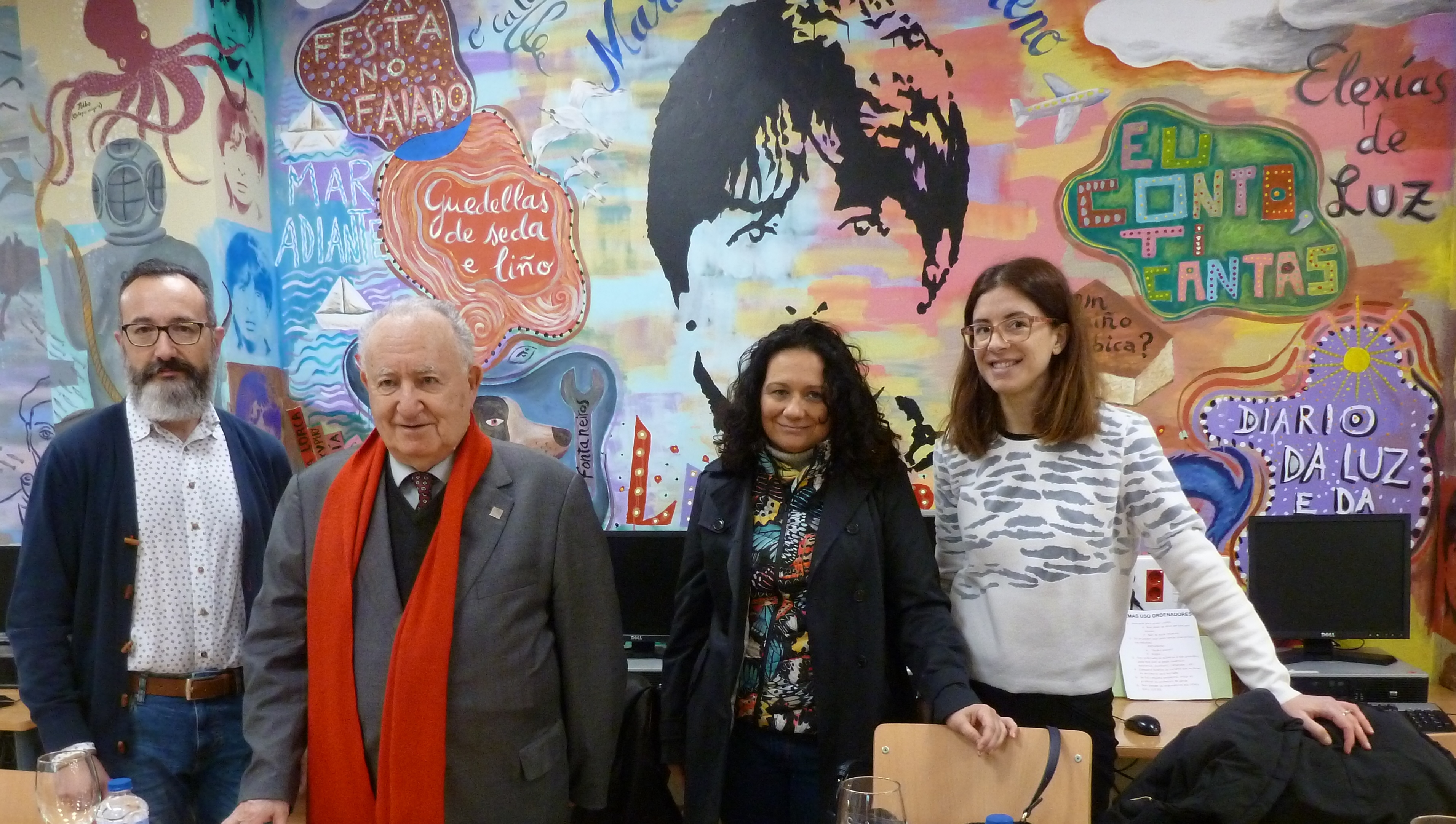 Presentación de "Doce cartas a Rosalía" no IES Torrente Ballester, 09/04/2018: Director do IES, Xesús Alonso Montero, Ánxela Gracián, Rep. de Hércules de Ediciones